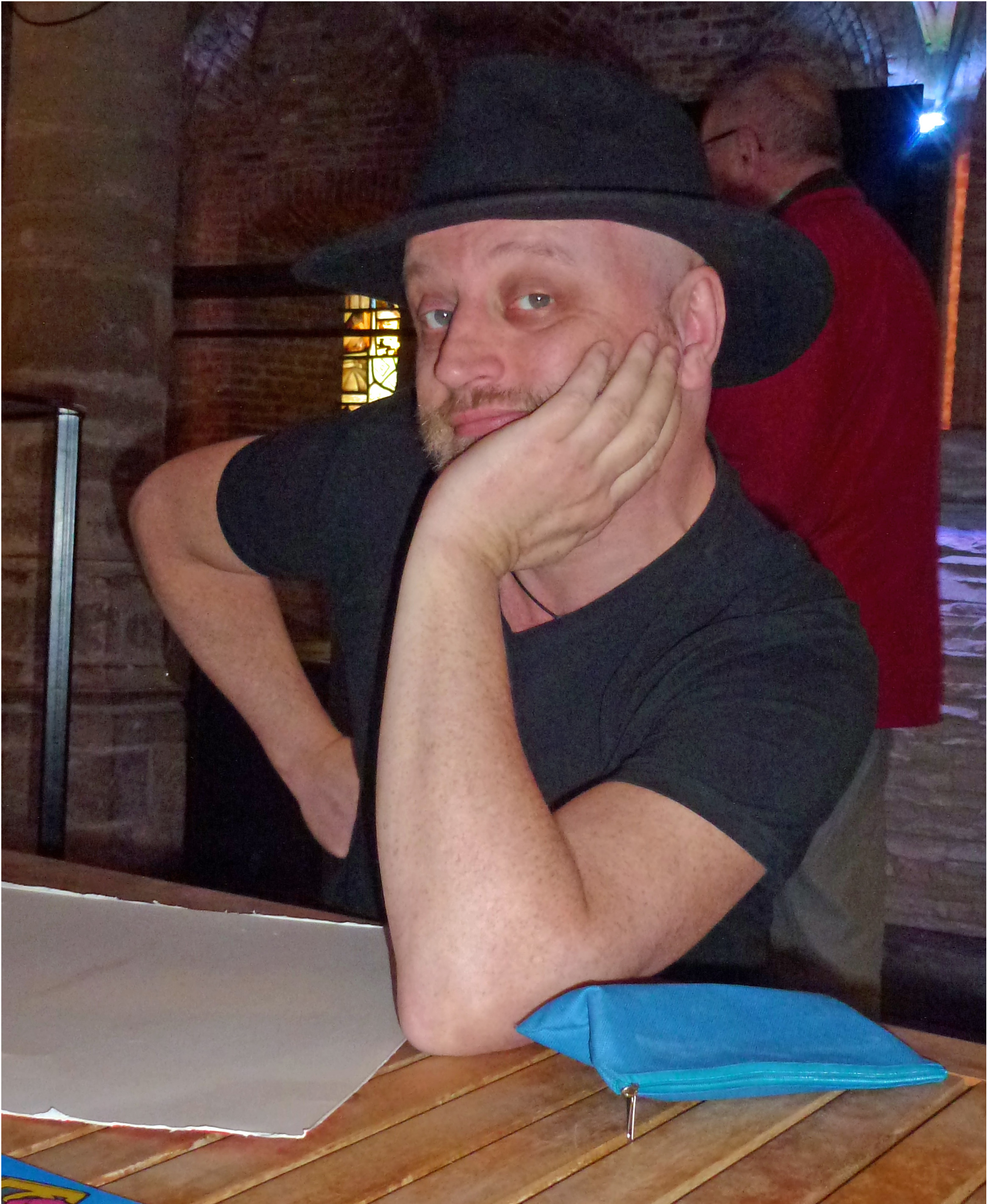 Remco Polman Foto genomen tijdens Strips op de Markt (Gouda, 7 mei 2017)